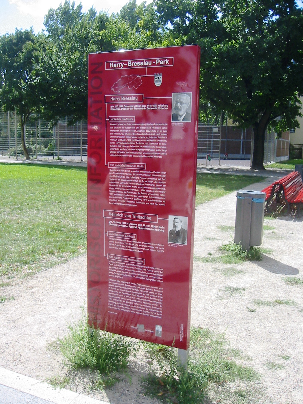 Infostele über den Konflikt zwischen Bresslau und Treitschke im Harry-Bresslau-Park in Berlin-Steglitz